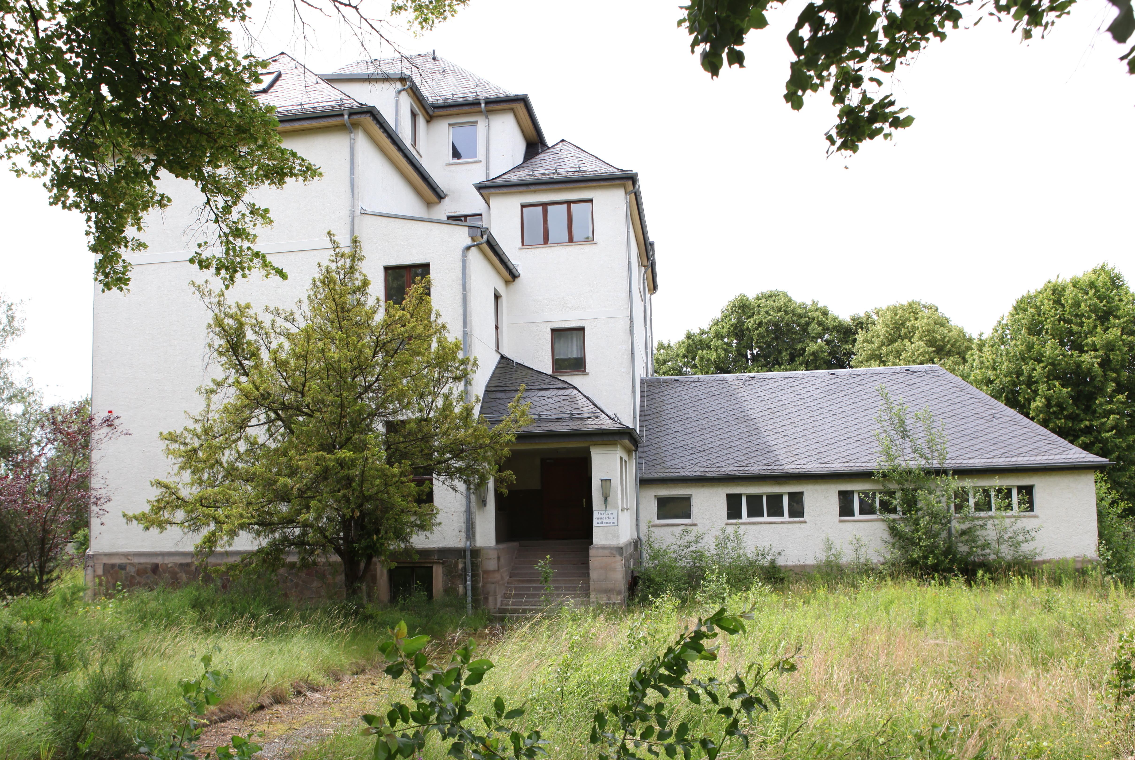 Ehem. Staatliche Regelschule Sonneberg-West in Bettelhecken, OT von Sonneberg, Thüringen